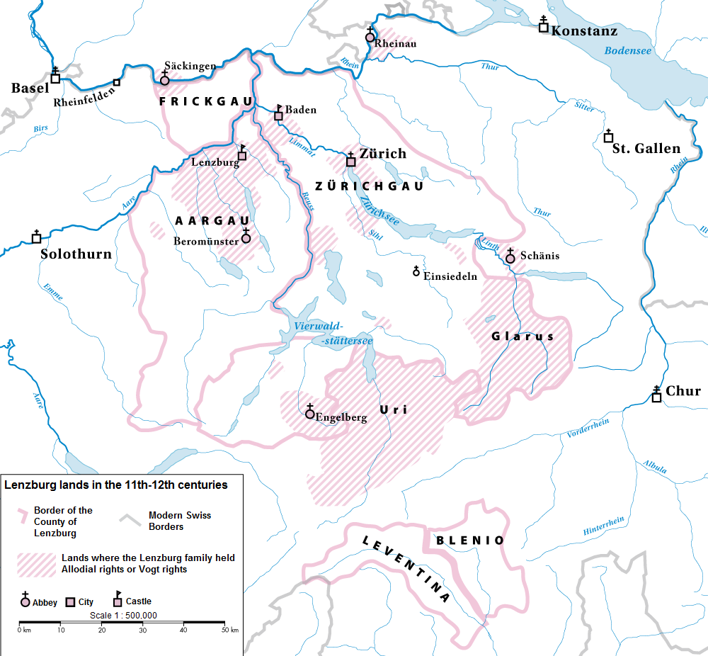 Der Macht und Herrschaftsbereich der Lenzburger im 11./12. Jahrhundert